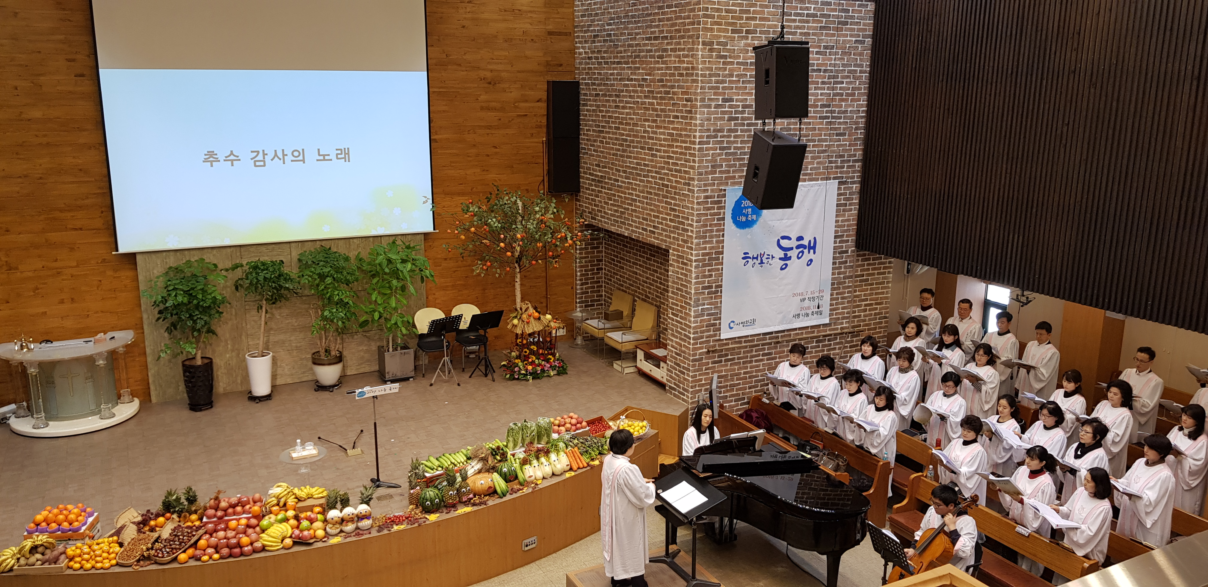 추수감사절 예배